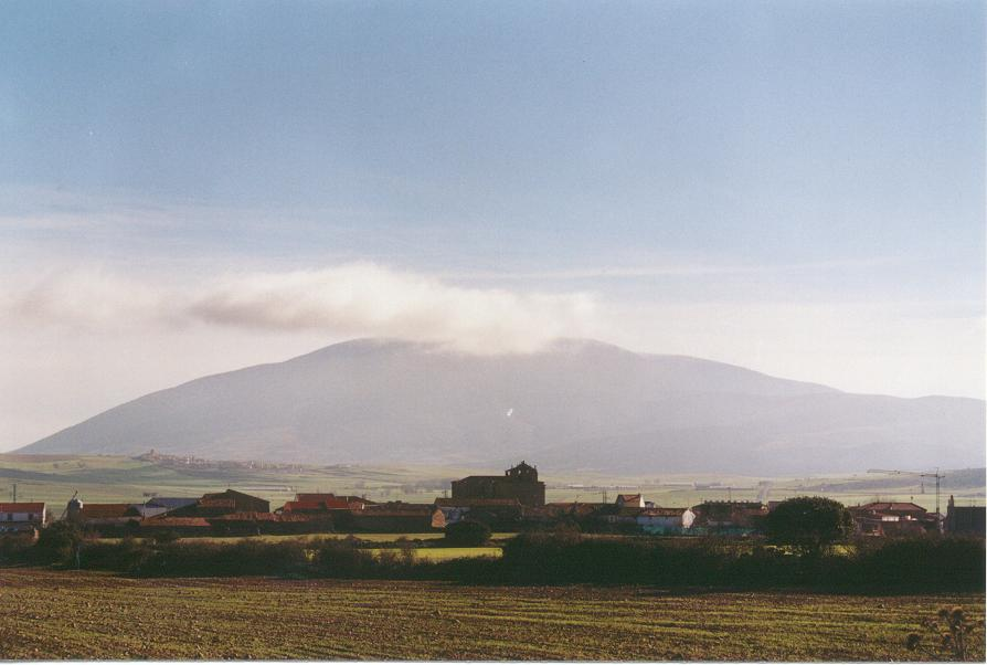 Vista general de Matalebreras